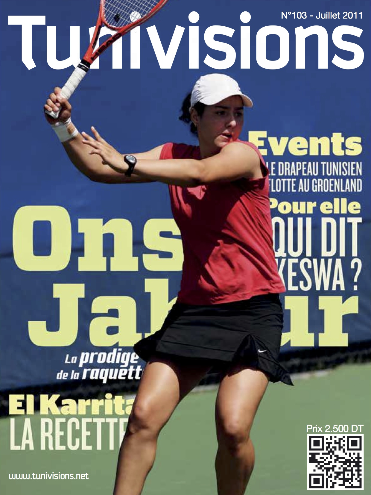 Couverture du numéro 103 du magazine tunisien Tunivisions.